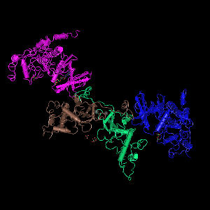 CK2 holoensüümi 3D struktuur